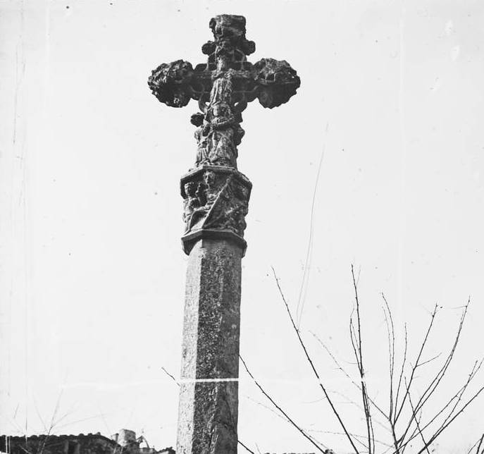 Creu de terme de Santa Coloma de Queralt. Joan Roig i Font (1914)